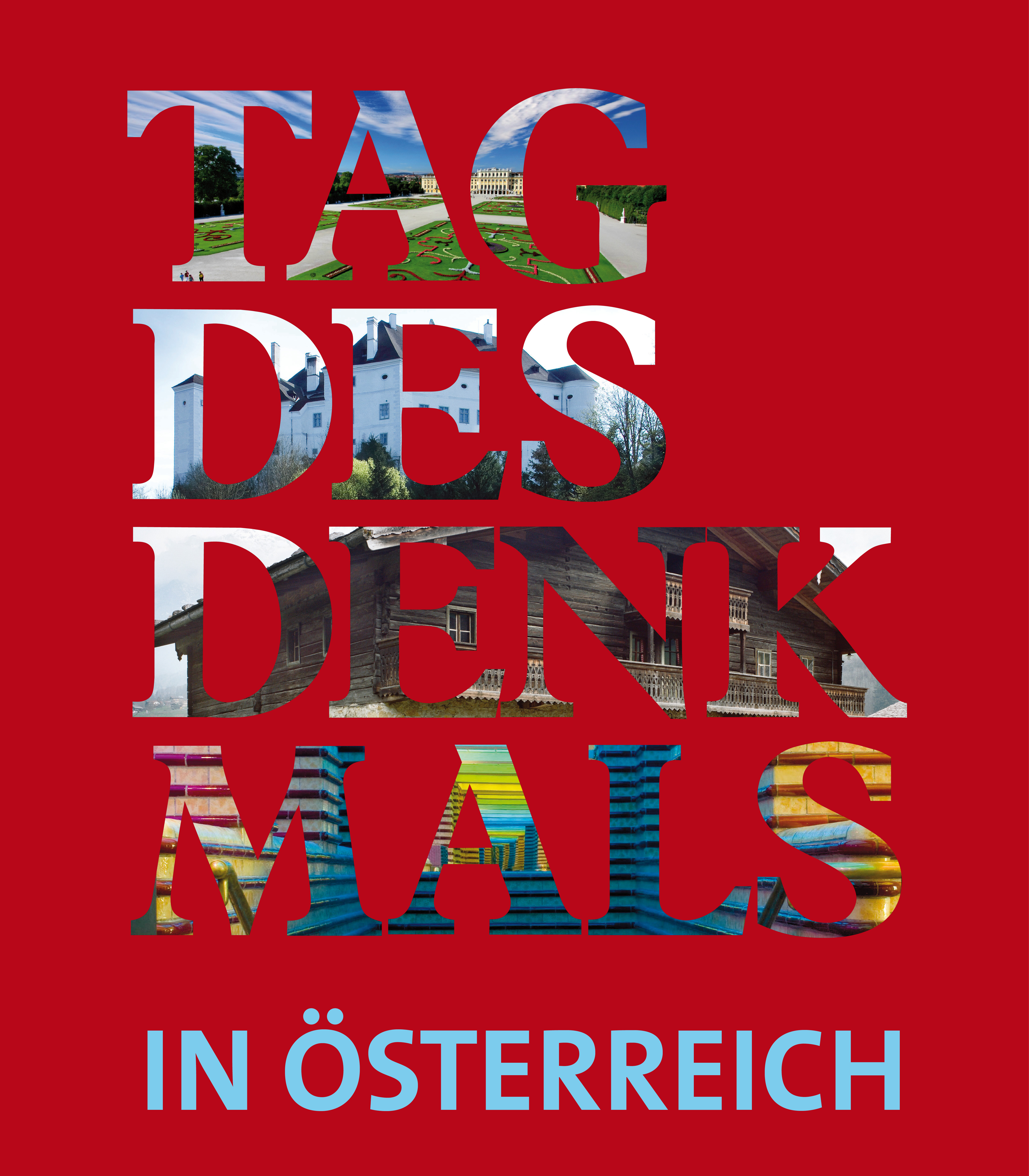 Vom Bundesdenkmalamt für die Kooperation 2011- mit Wikipedia zur Verfügung gestellt.